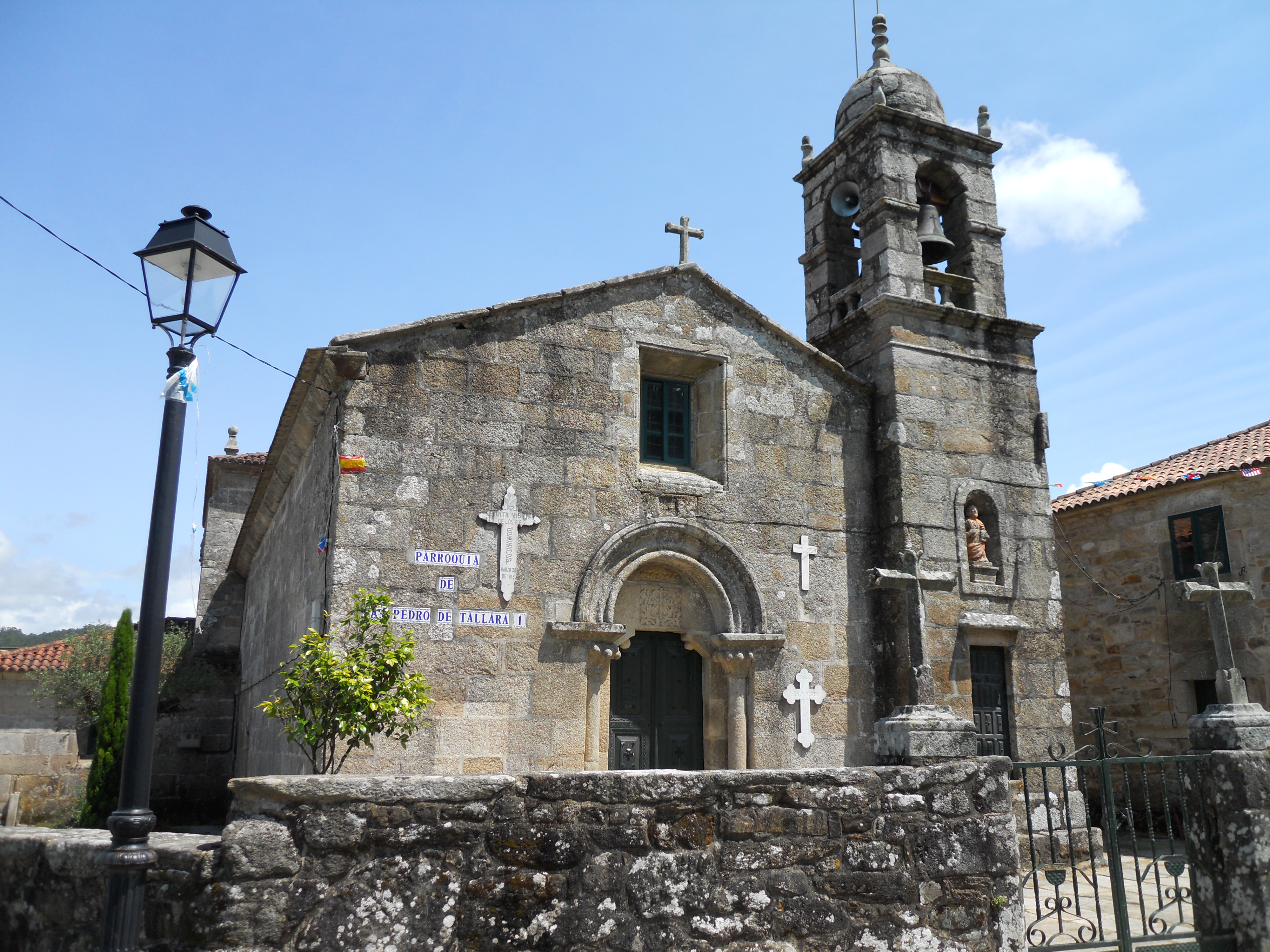 Construida en el siglo XII, ya poco nos llegó de su pasado románico.